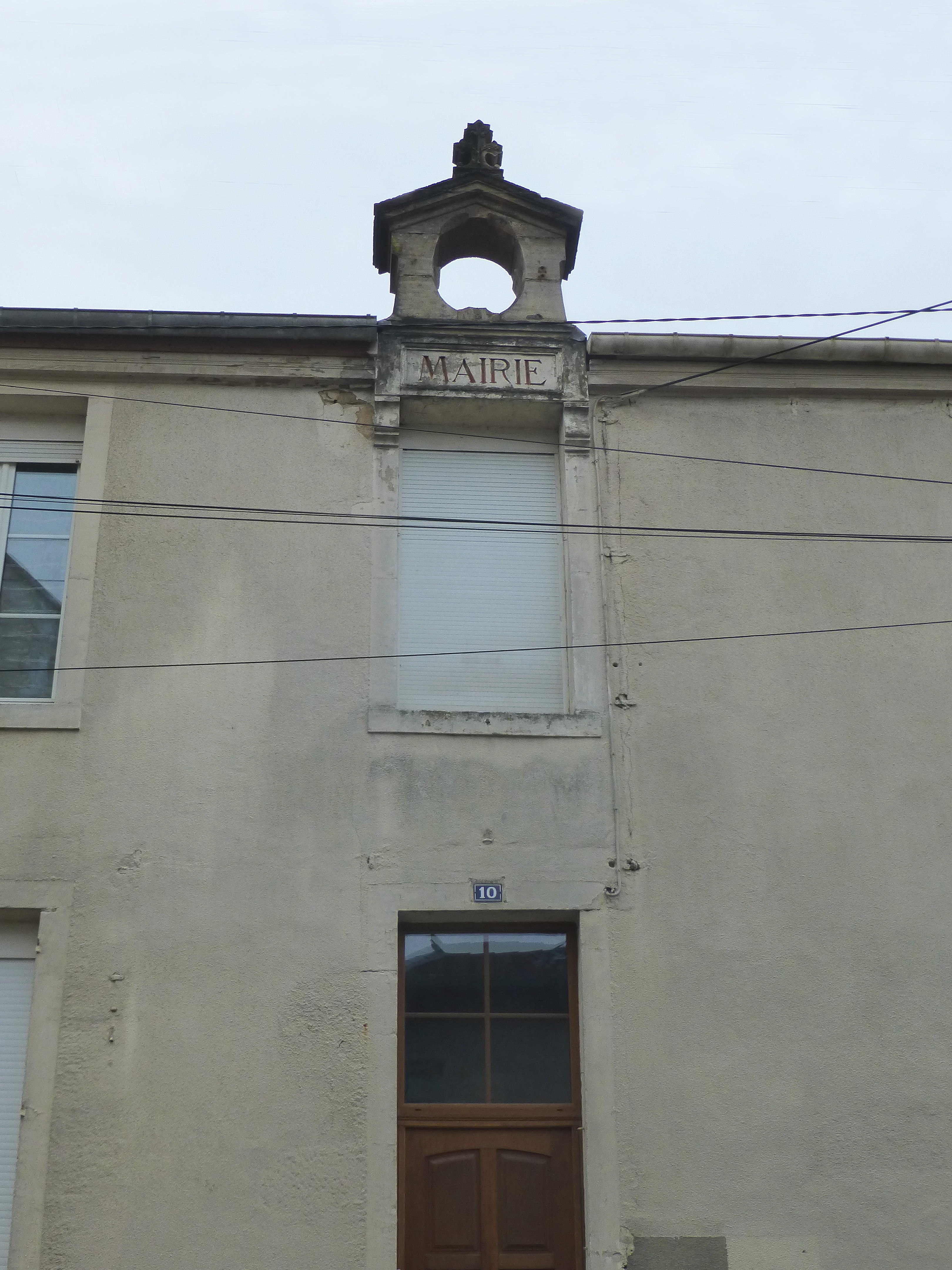 Mairie de Savonnières-devant-Bar (Meuse)